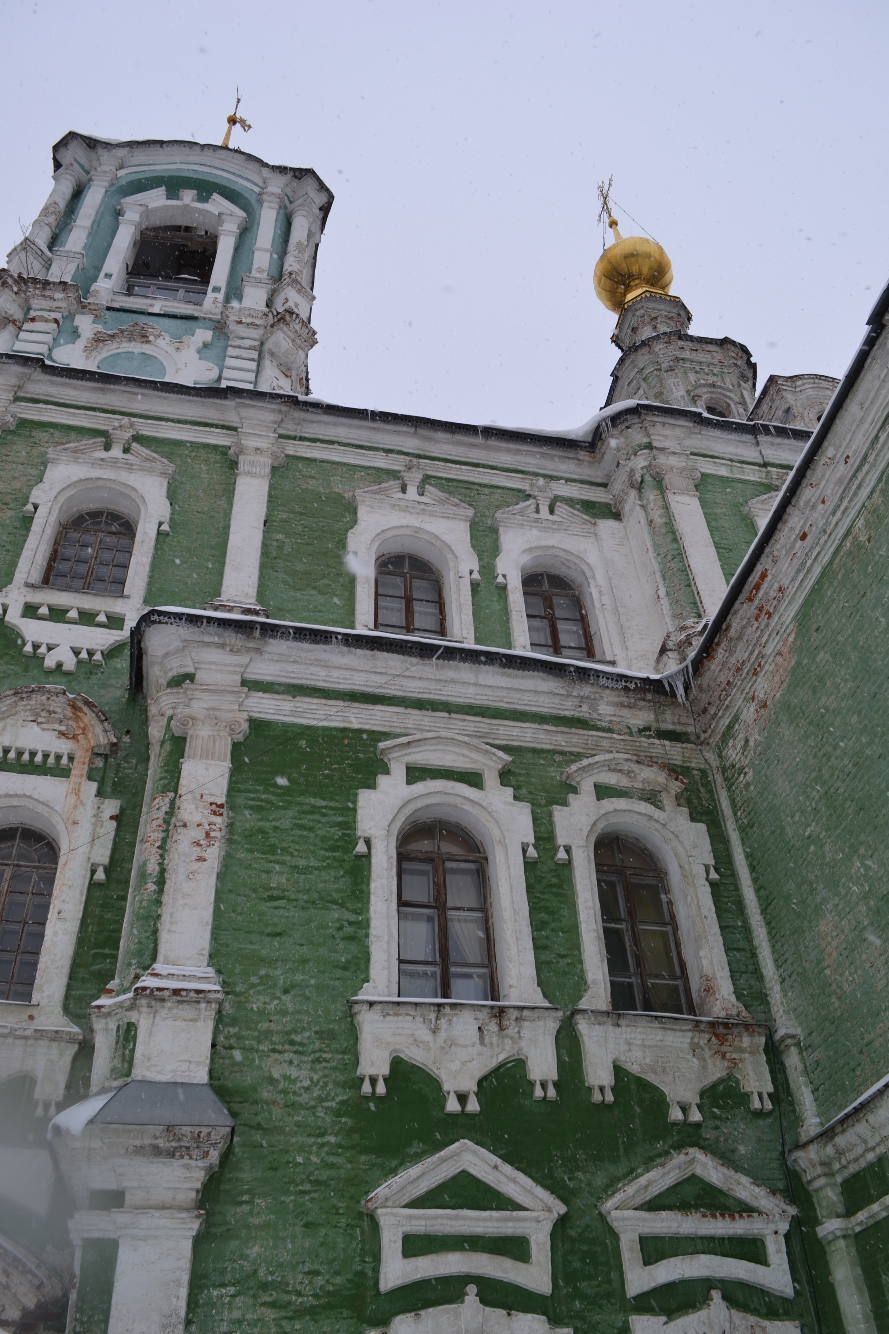 Никитская церковь во Владимире (февраль 2015)